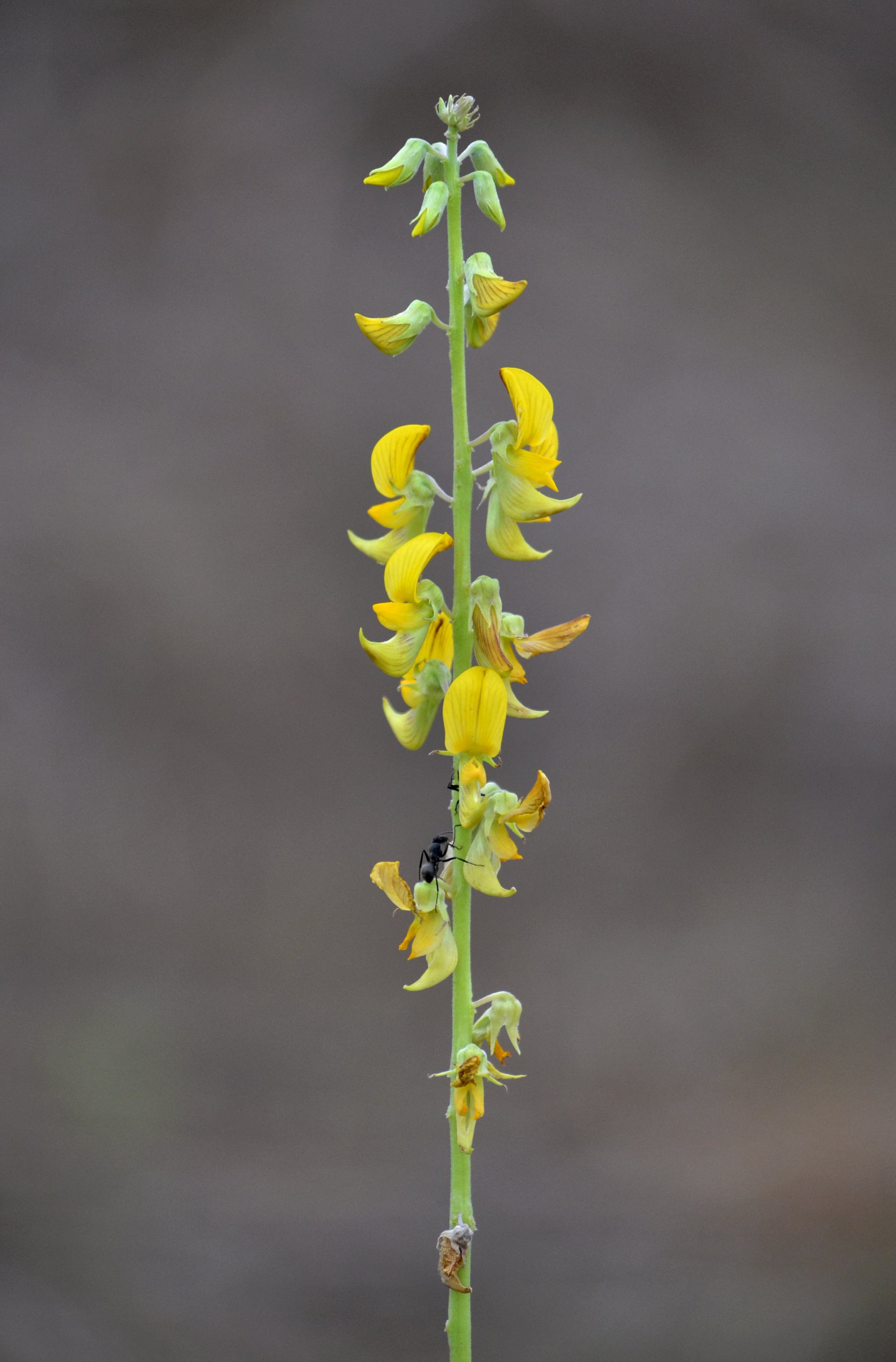 കിലുകിലുപ്പ